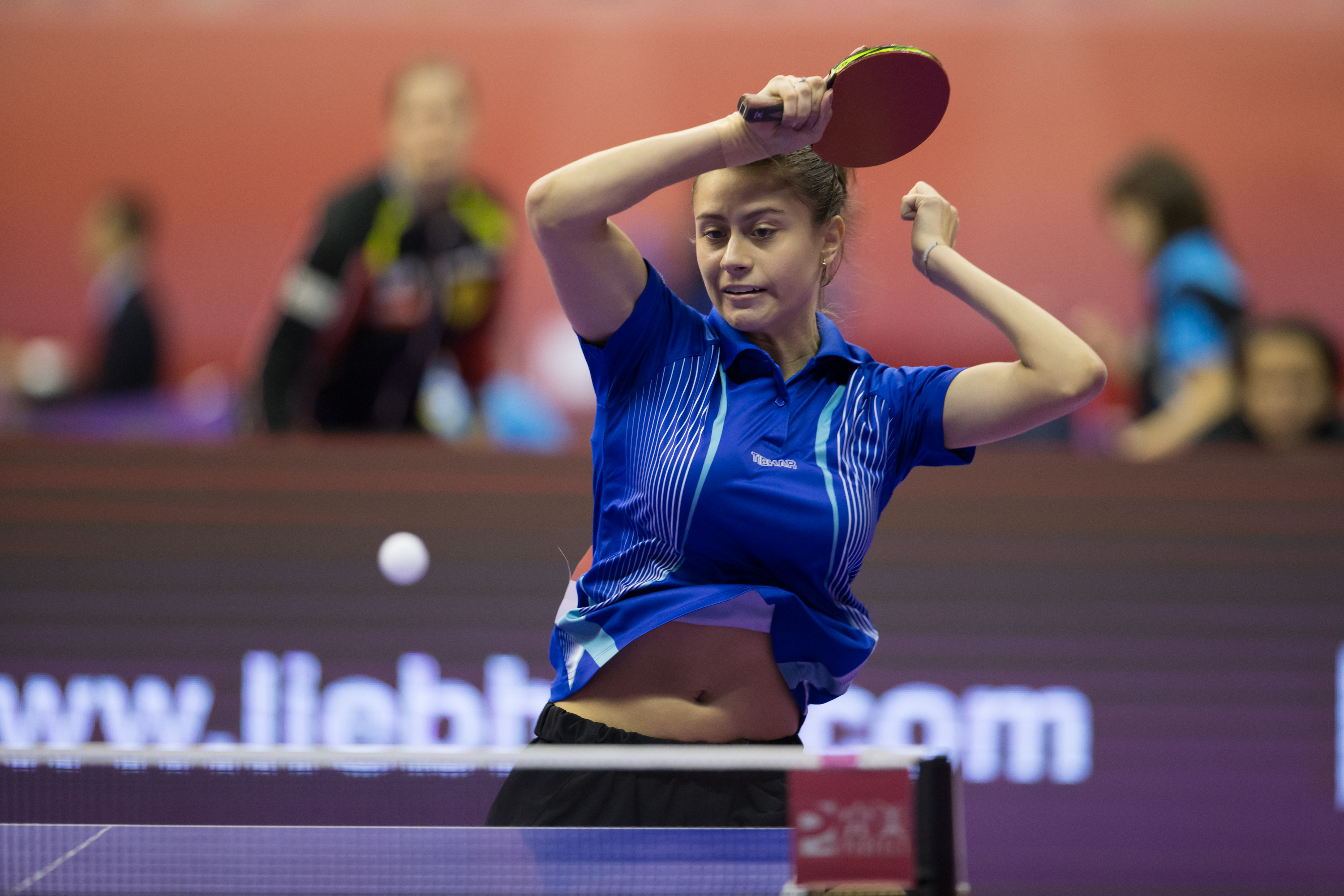 _K0K1098